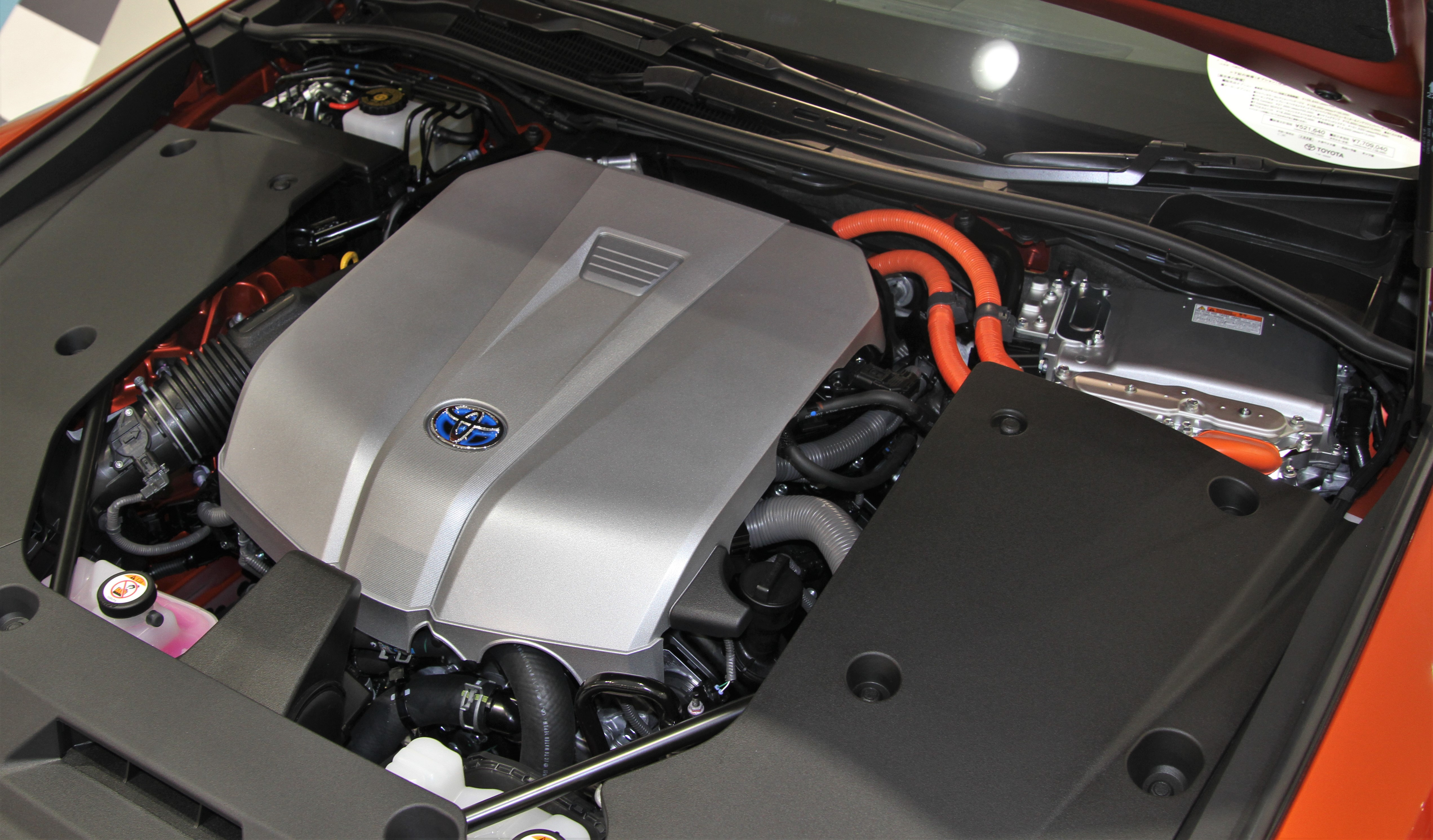 Toyota Crown (S220)